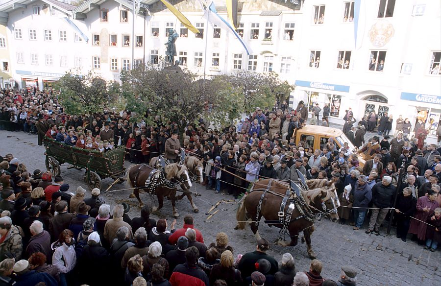 Gespann bei der Leonhardifahrt 2006 in Tölz in der Marktstraße Photograph: Florian Schott